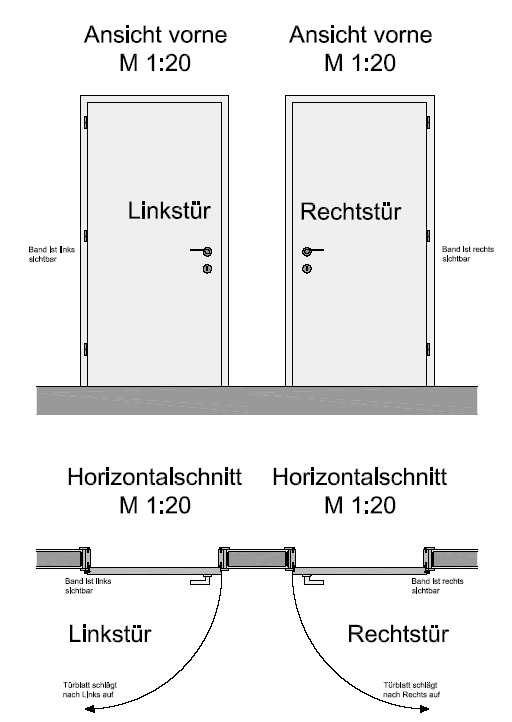 Bild beschreibt die Benennung der Aufschlagrichtung von Türen. Es wurde im Jänner 2007 von mir selbst erstellt (Christoph Ehrensberger). Hier der Häck